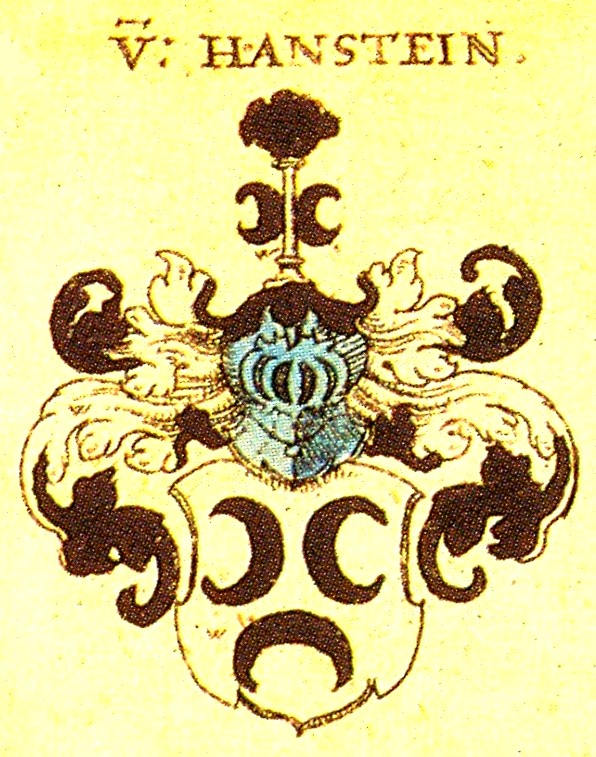 Wappen Familie von Hanstein